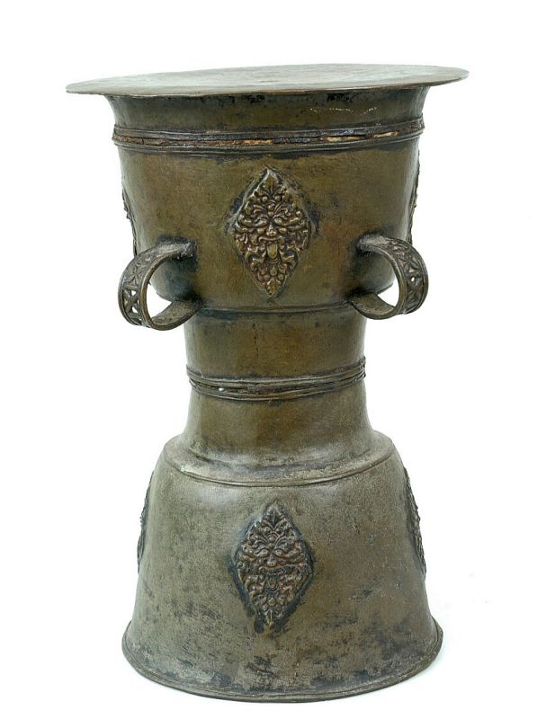 Trom. Keteltrom, hol, gemaakt van een koperlegering met vier handvatten. Op beide brede gedeeltes 4 ruitvormige versieringen met fantastische mensenkoppen. De keteltrom of Moko werd tot het begin van de 20e eeuw gebruikt als betaalmiddel. In 1914 werd dit afgeschaft en verboden (behalve nog bij bruidsschatten). Om zoveel mogelijk mokos uit de circulatie te halen kon er nog belasting mee betaald worden. De 1300 mokos die zo ingeleverd werden, werden plat geslagen en als oud metaal verkocht. Er zijn meer dan 2000 keteltrommen bewaard gebleven. Oude mokos zouden vooroudergeesten huisvesten en werden als zodanig vereerd. . Zandlopervormige keteltrom Unknown language: Moko